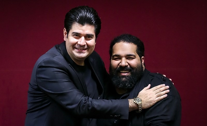 نشست رسانه‌ای کنسرت تلفیقی «عشق من ایران من» عصر ۱۳ شهریور ماه ۹۲ با حضور سالار عقیلی خواننده سنتی، رضا صادقی خواننده پاپ، فریبرز سفردوست مدیرعامل موسسه شکوه موسیقی ایرانیان در برج میلاد برگزار شد.